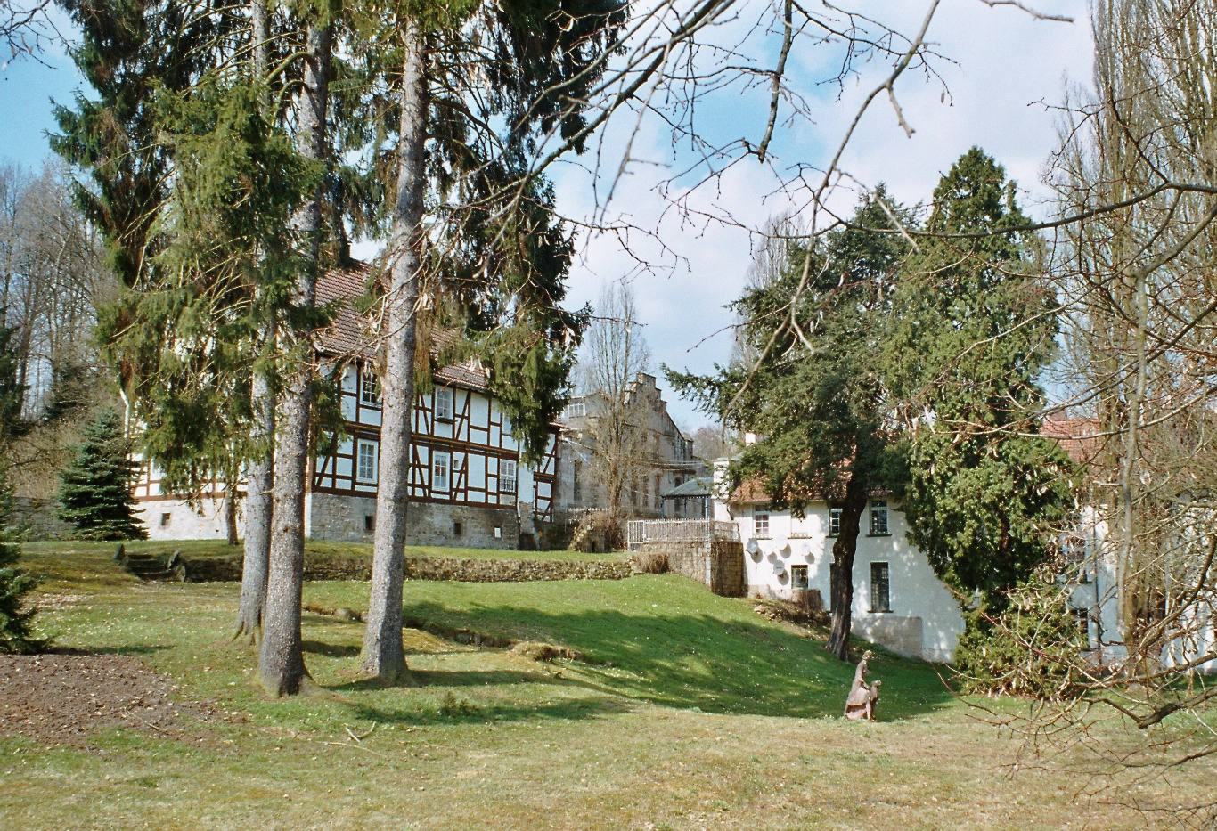 Eisenhütte: Park und Gießerei Quelle: selbst fotografiert Fotograf/Zeichner: presse03 Datum: 08.04.2006